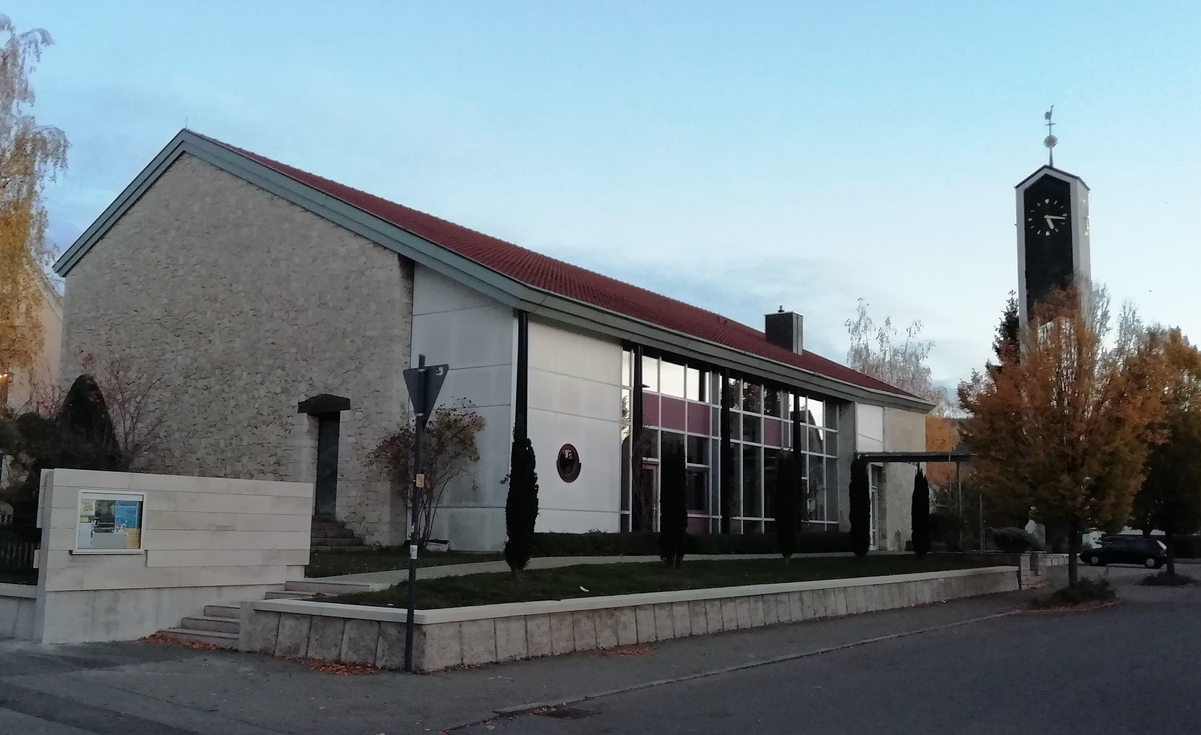 Aus Nordwest